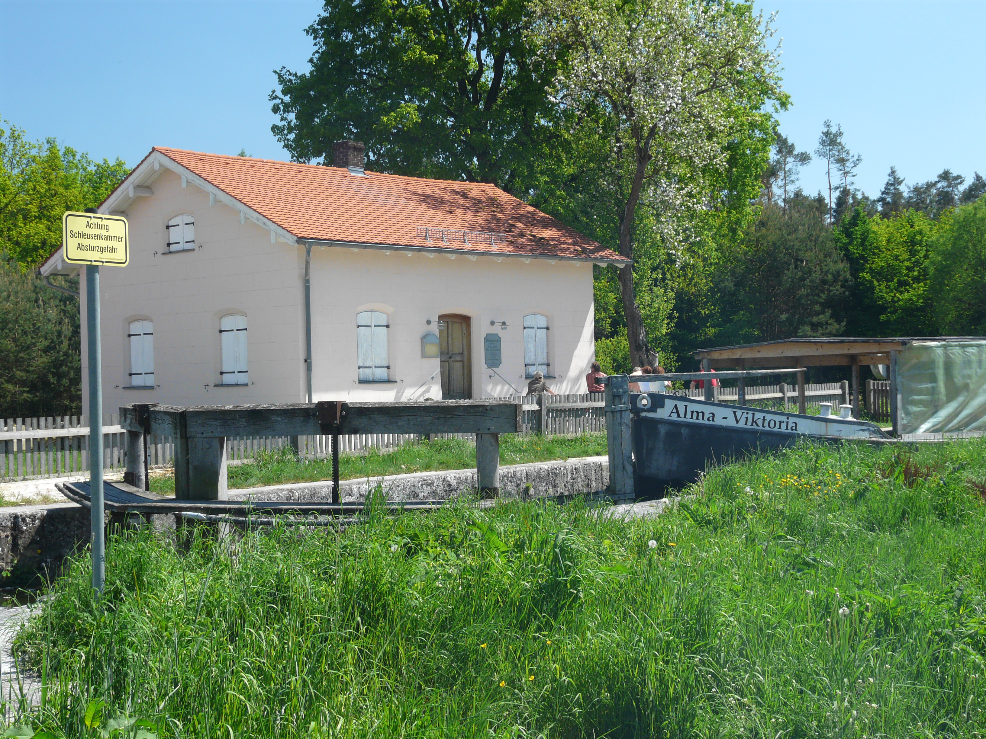 Fest vertäutes Treidelboot in Schleuse 25 des Ludwigskanal (bei Mühlhausen in der Oberpfalz)